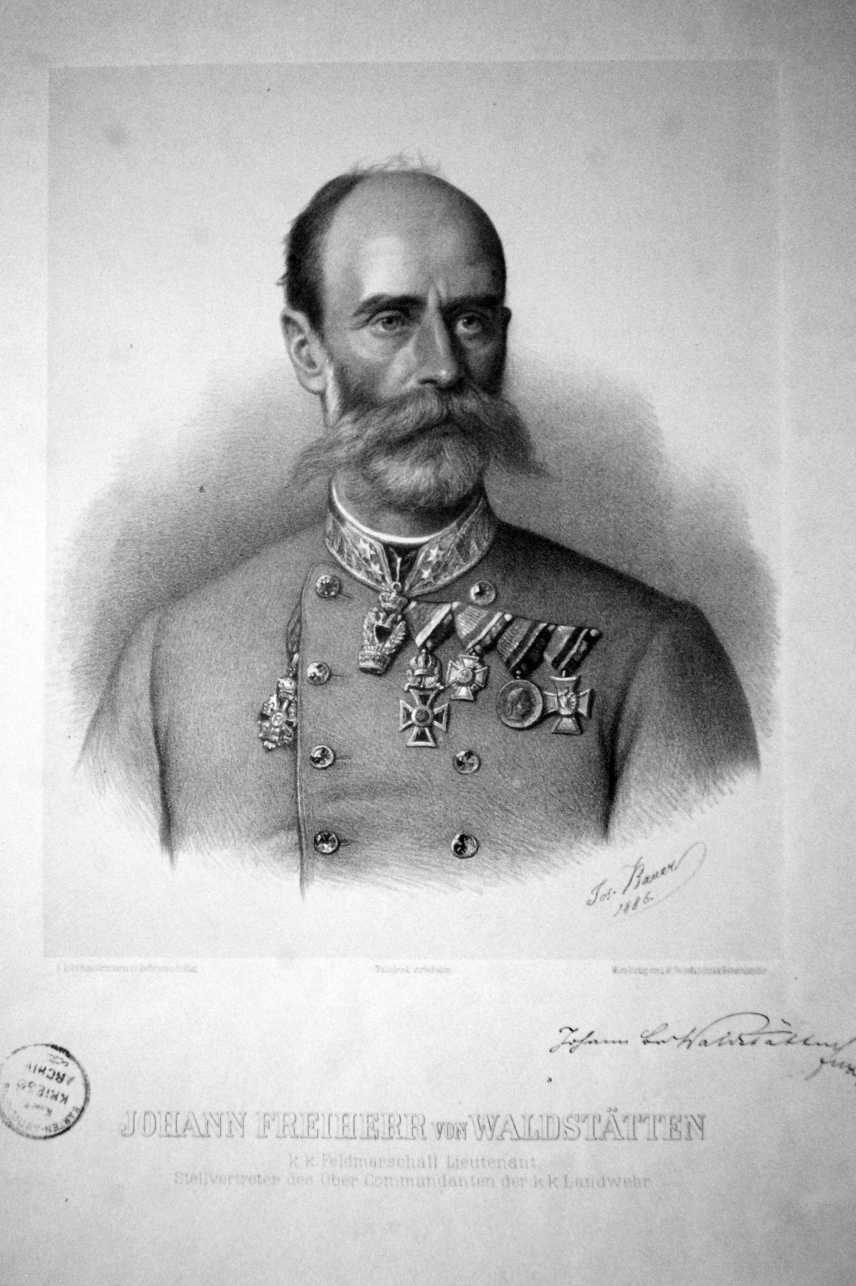 Johann Baptist Freiherr von Waldstätten (1833-1914), k. k. Feldzeugmeister, Militärschriftsteller. Lithographie von Josef Bauer, 1886